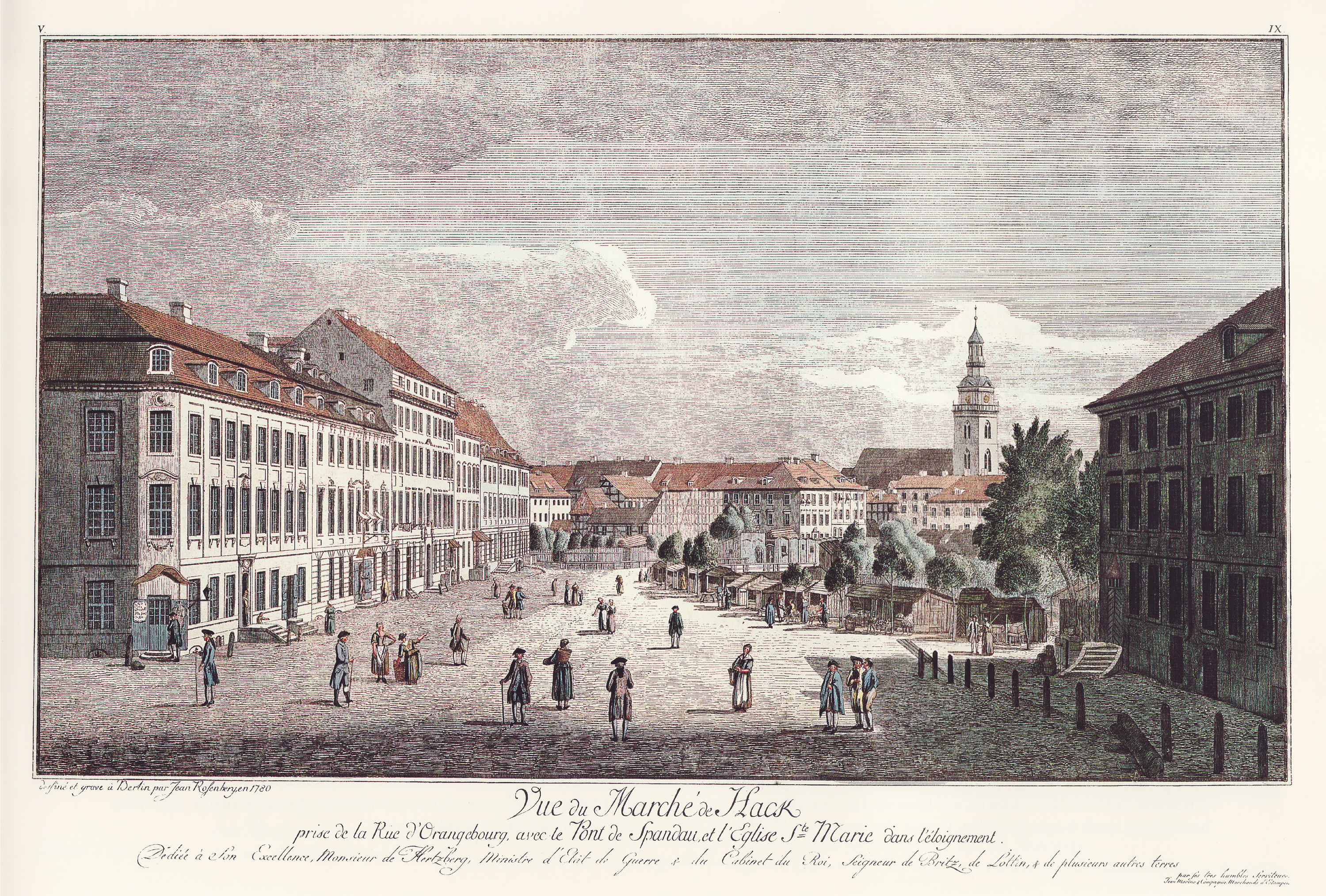 Ansicht des Hackischen Marktes mit Blick zu Marienkirche, Alt-Berlin/Deutschland